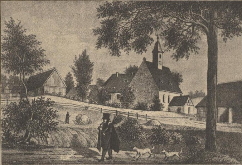 Beiträge zur Sächs. Volks- und Heimatkunde. Mit Zeichnungen von Professor O. Seyffert und Maler F. Rowland.